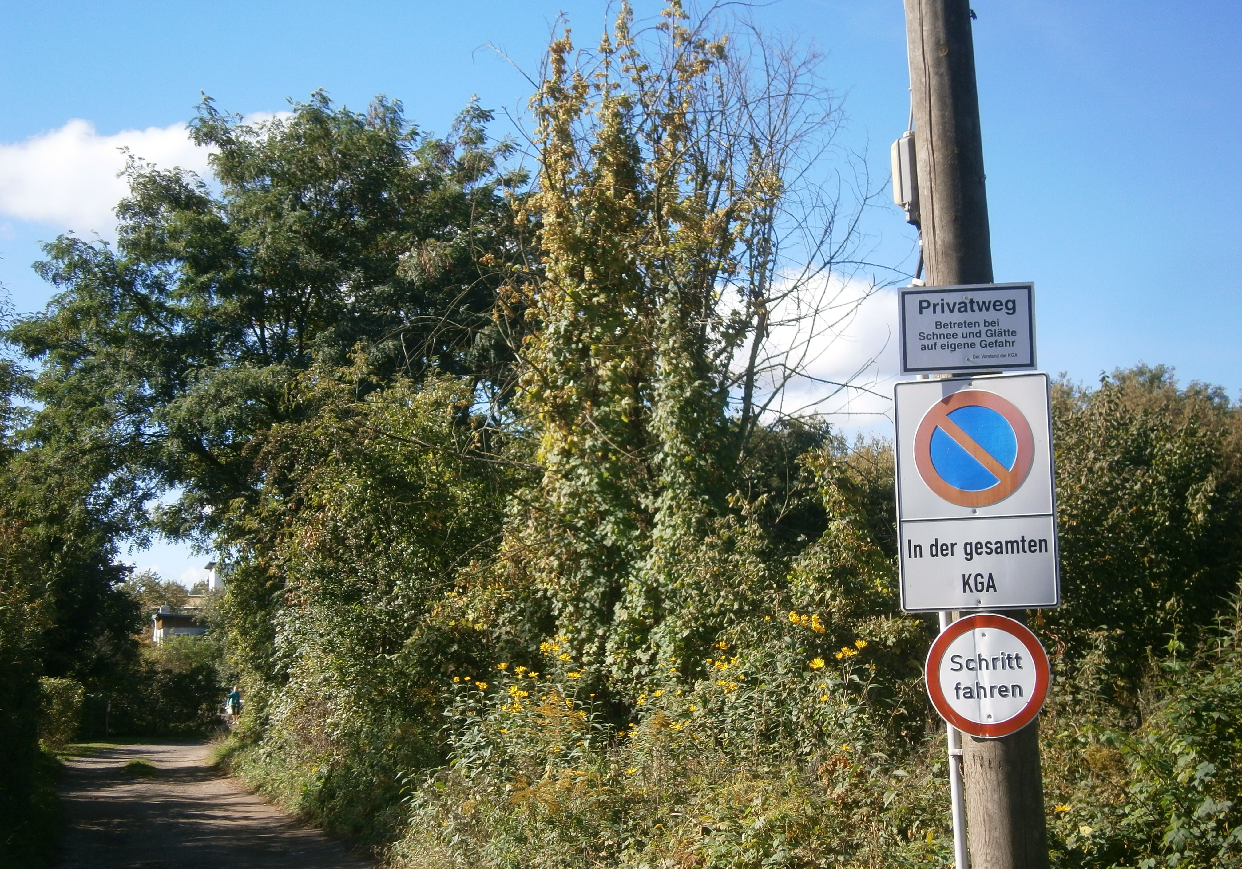 Der Bauernweg ist eine Straße in Berlin-Blankenfelde an der nördlihen Stadtgrenze und als Privatstraße und zur Zufahrt für die hier liegenden ehemaligen und bestehenden Deponie Arkenberge angelegt. In der Gesamtlänge als Bauernweg bezeichnet ist ein Teil amtlich gewidmet, zudem verläuft sie durch die KGA Arkenberge zur Hauptstraße als ungewidmete Straße (Fahrweg). Hier die Vorschriftsschilder am Nordrand innerhalb der KGA.